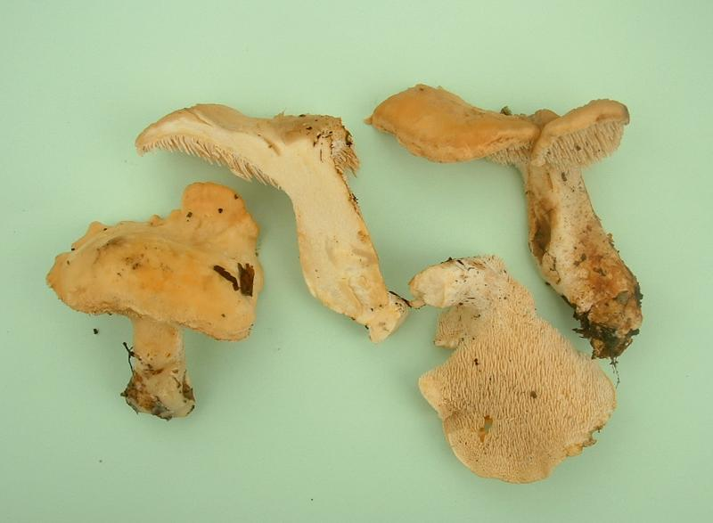 pied de mouton, photo J.F. Gaffard, Étrelles-et-la-Montbleuse, octobre 2004